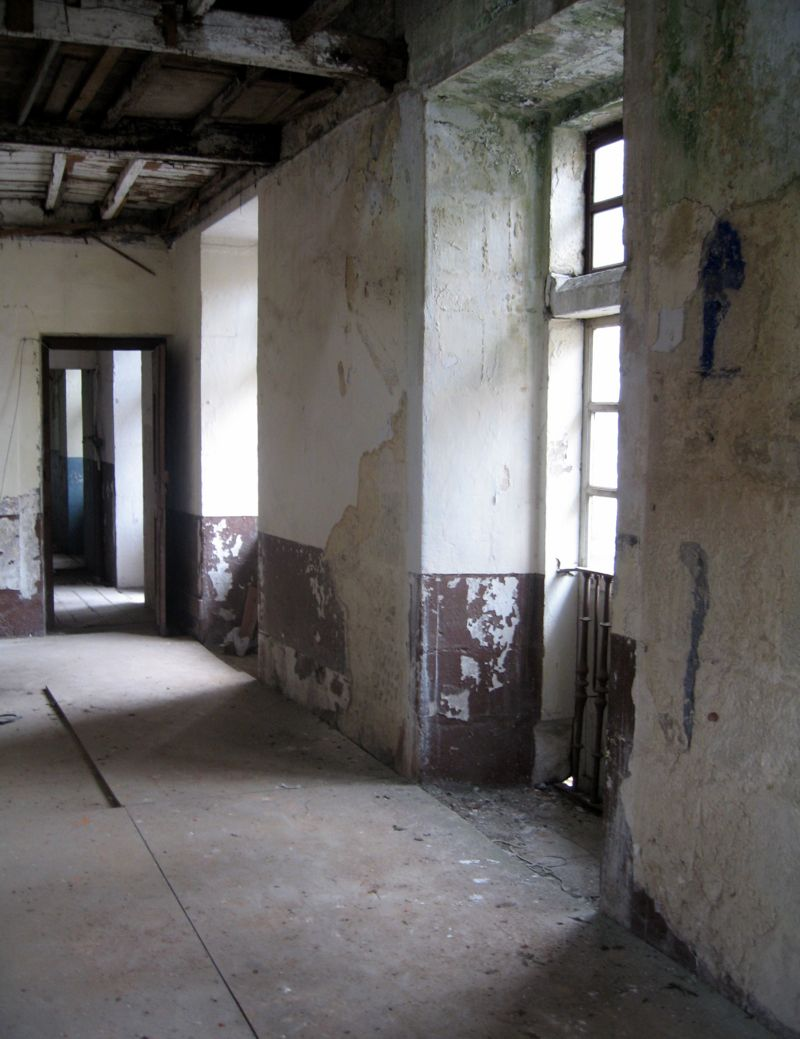 Interior de la Casa del Cabildo antes de la intervención de restauración llevada a Cabo por el Consorcio de Santiago.